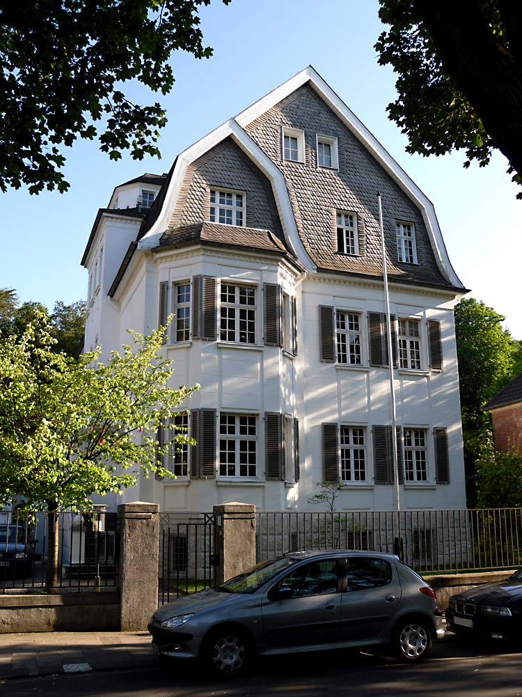 Hous Meliesallee 3, Düsseldorf-Benrath